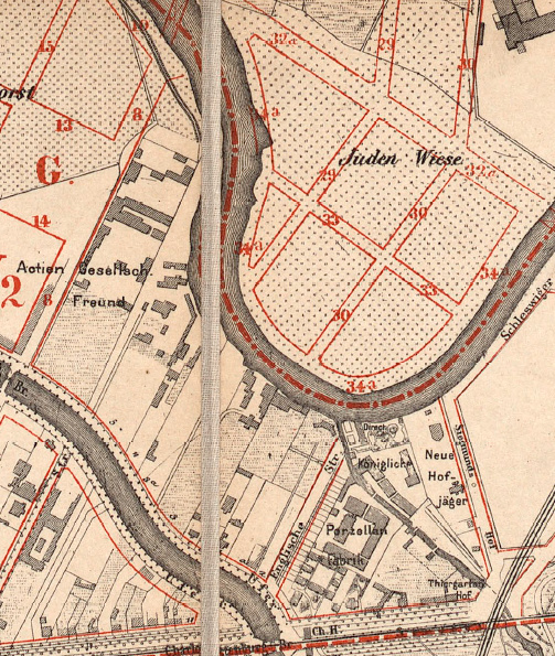 Übersicht über die Lage der "Spreestadt" um 1882 aus dem Digitalisat des "Situationsplan von Berlin mit dem Weichbilde und Charlottenburg. Neu aufgenommen und gezeichnet von Sinbeck Major a.D., Berlin Verlag von Dietrich Reimer" leichter zugänglich gemacht.